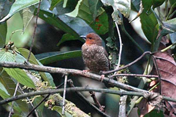 Jameson's Antpecker (Parmoptila jamesoni) female, Uganda